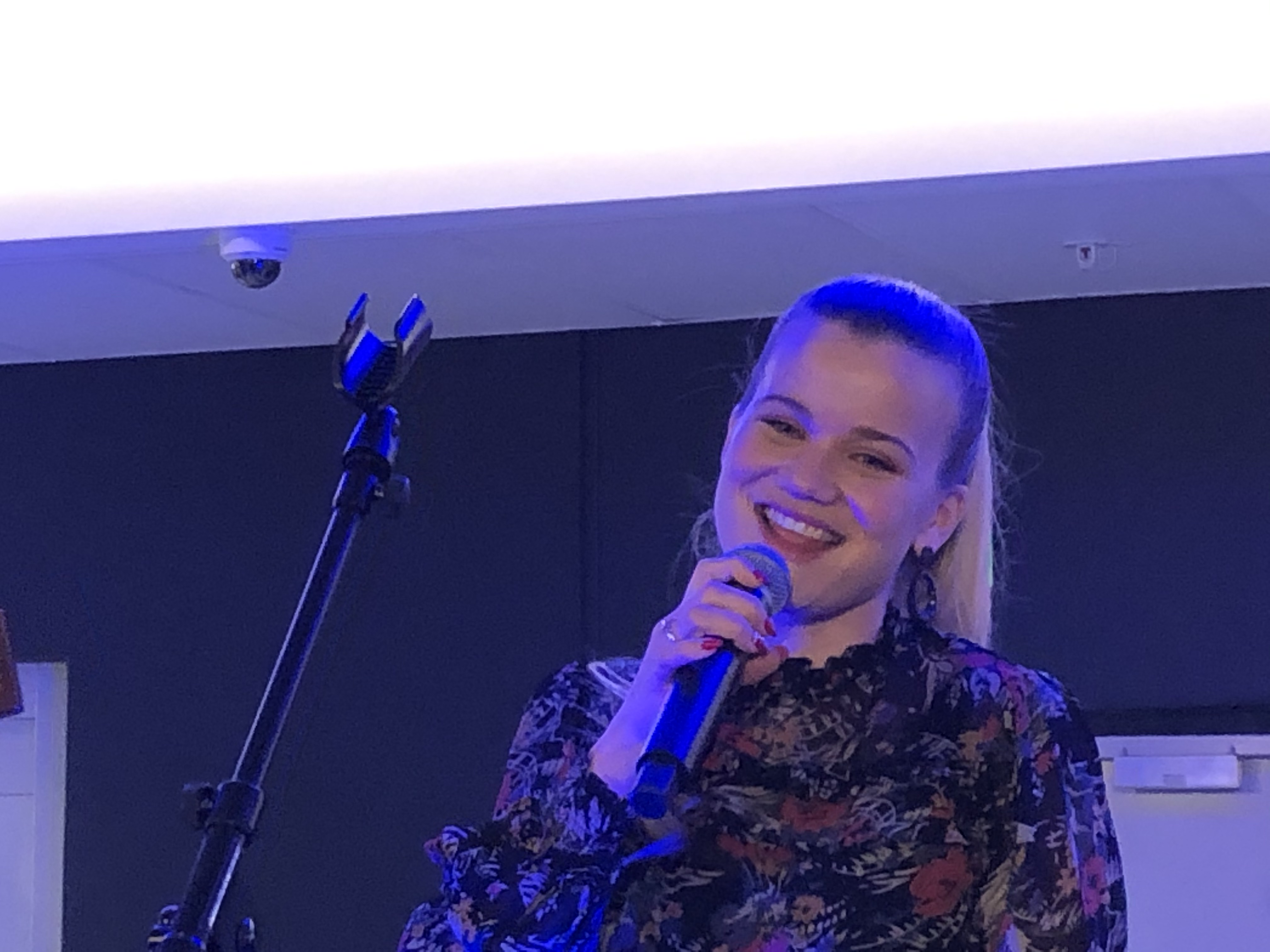 Sandra Lyng under en konsert på Kuben Senter i Hønefoss 12. desember 2019.